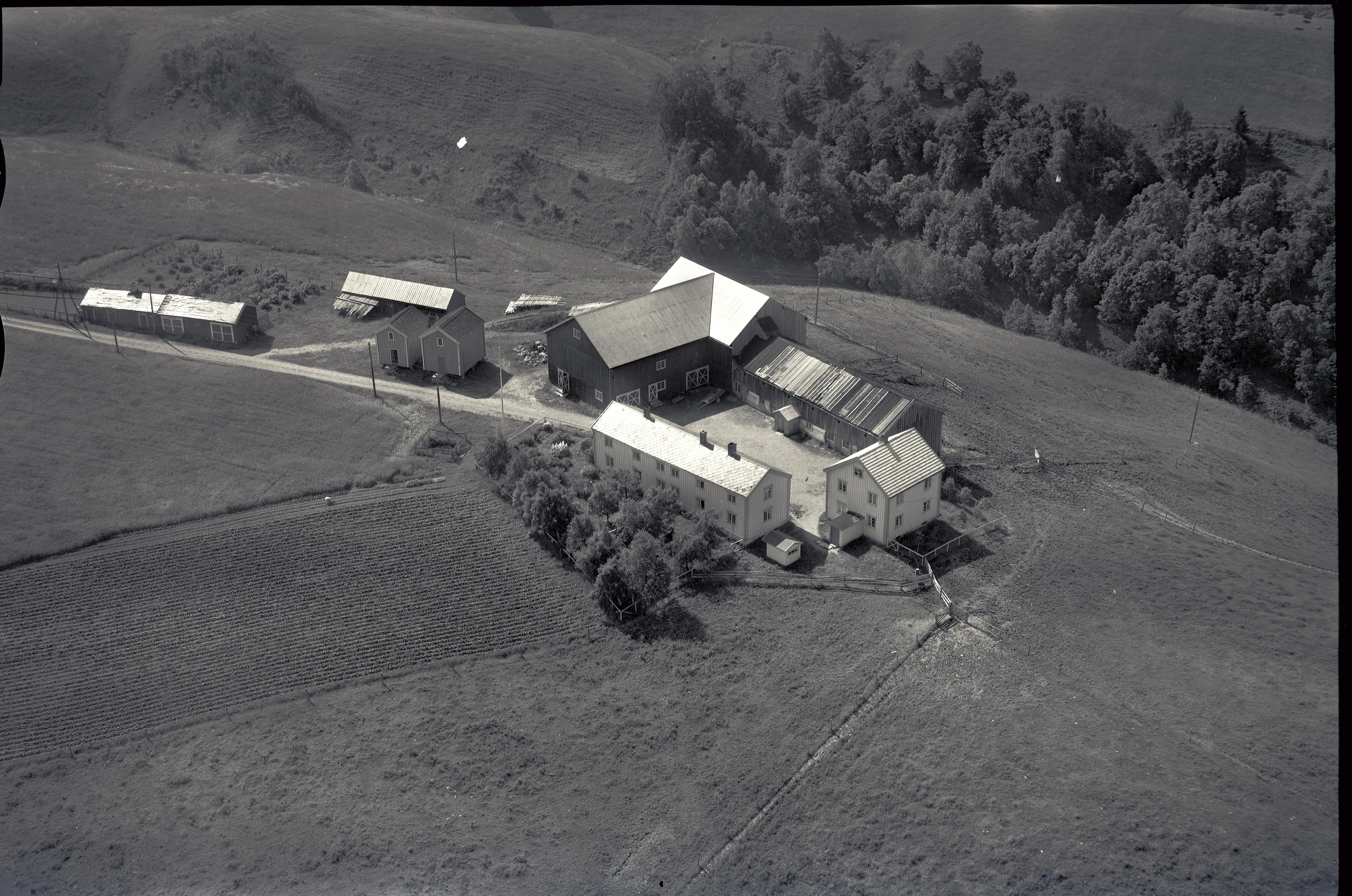 Gårdsbruk i Tiller: Tonstad gård. Fjøs, låve, våningshus, uthus, jorder. Trondheim kommune overtok i 1937 parseller av Tonstad, disse er senere brukt som byggegrunn for Tillerbyen